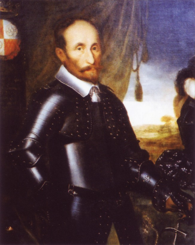 Graf Wilhelm Wirich von Daun-Falkenstein (1613-1682), Maler: Pieter Nason